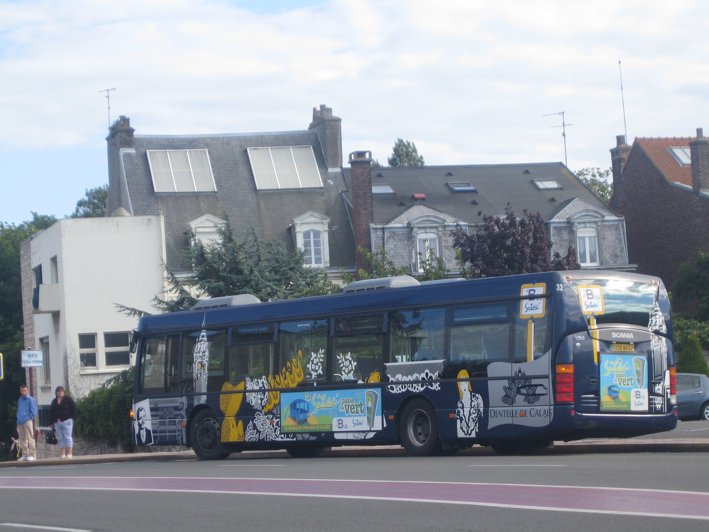 Calais.